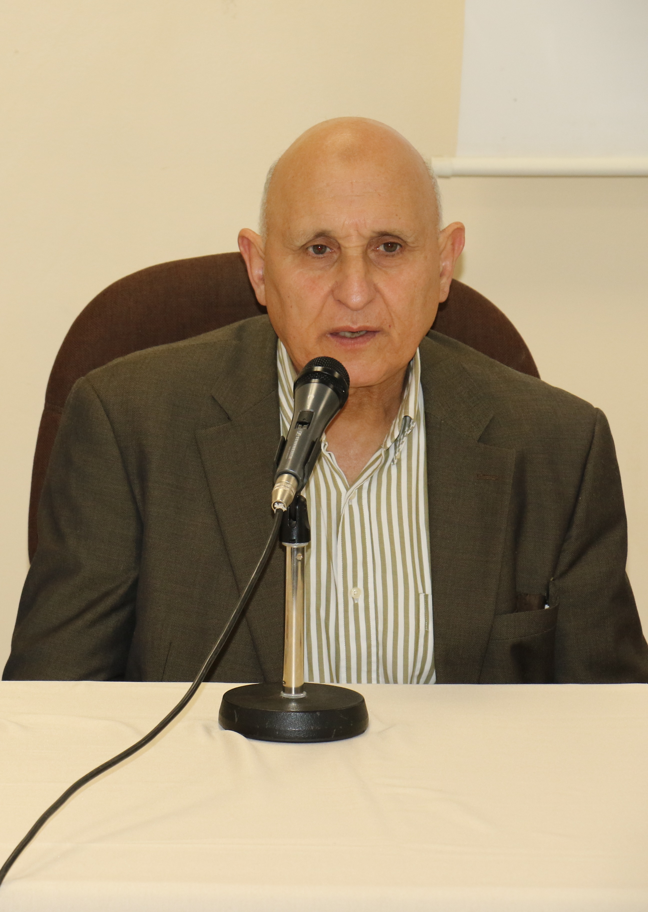 L’écrivain marocain Ahmed Marzouki lors d'un talk, le 21 mars 2017 à Ifrane.